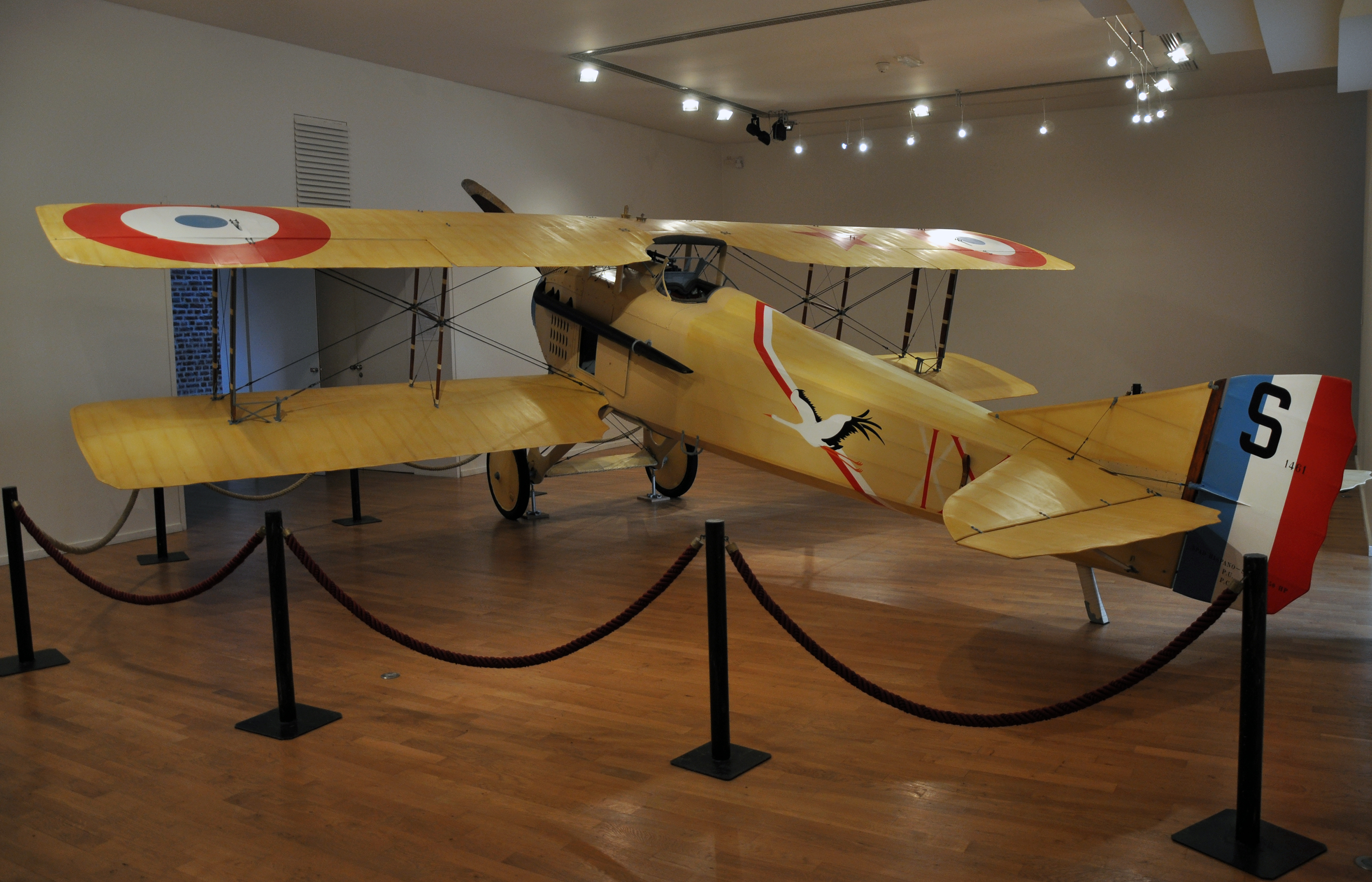 SPAD VII, Musée de Cambrai ( France ).